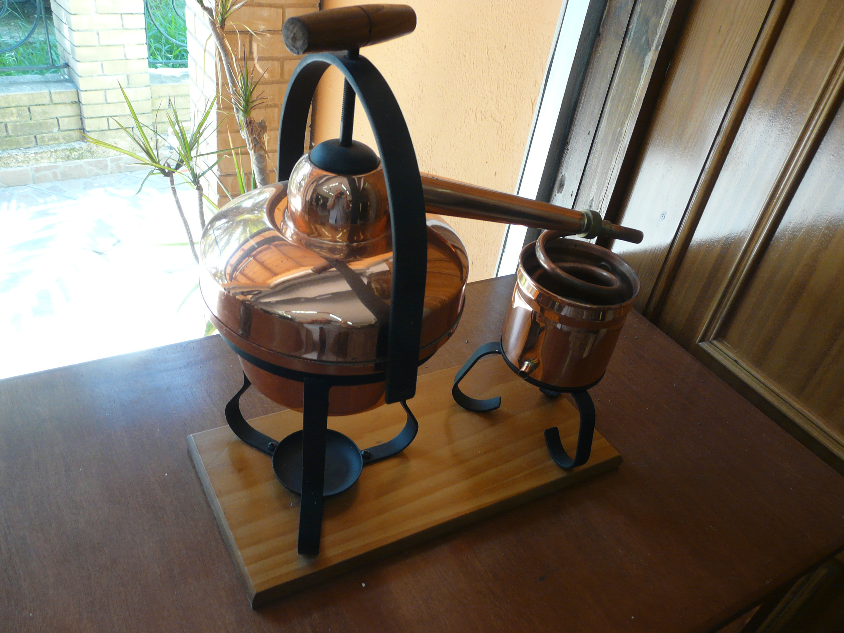 Kumquat (Fortunella) distillatery. Corfu, Greece.